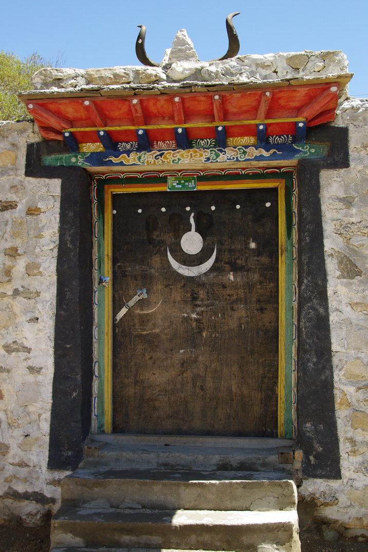 Symbol der Bön-Religion an Eingangstür